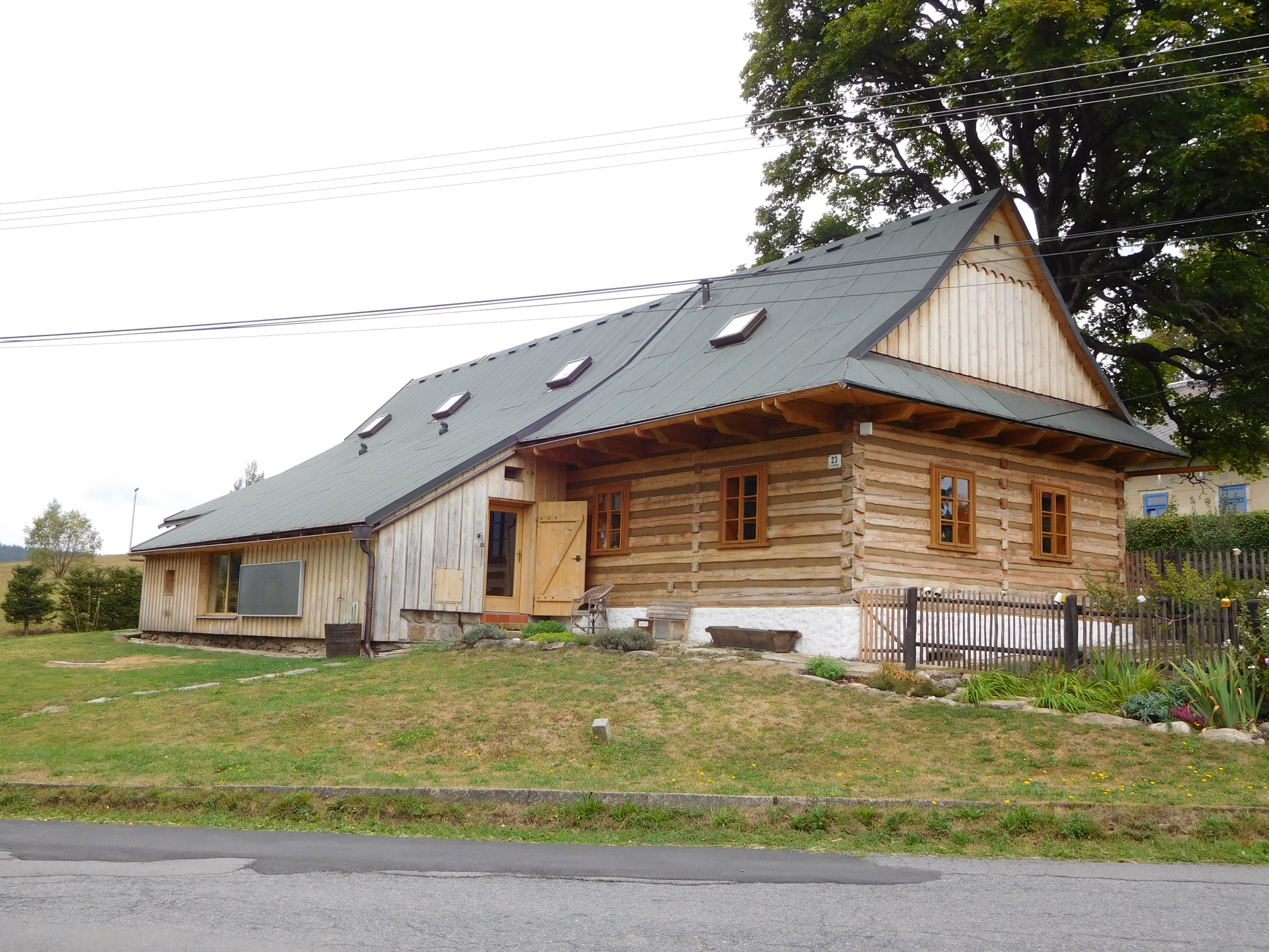 České Křižánky - č.p. 23